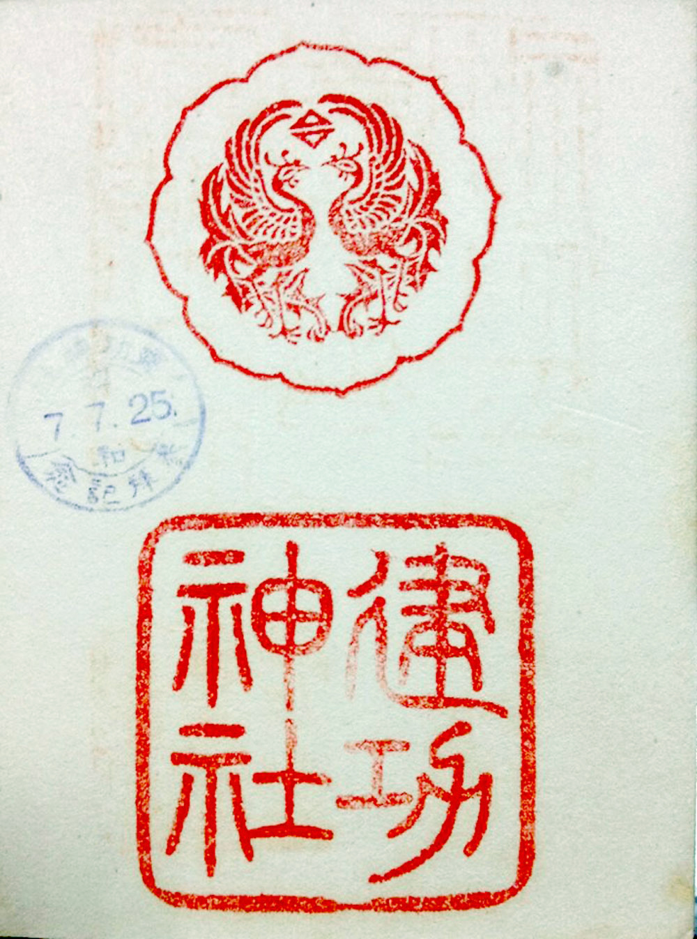 中文（台灣）: 建功神社御朱印